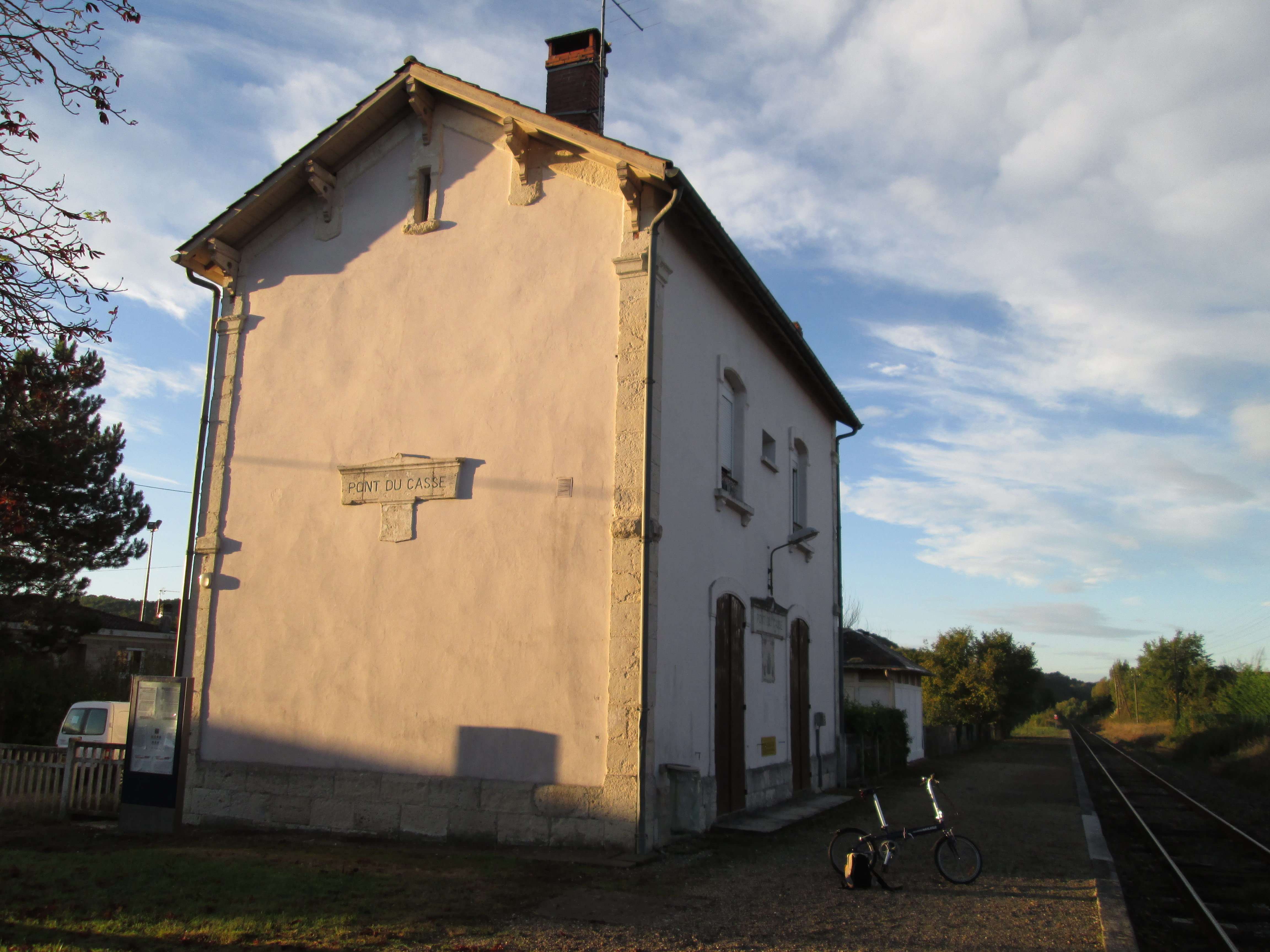 Ancien bâtiment voyageur de la gare de Pont-du-Casse (Lot-et-Garonne)